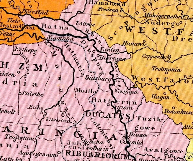 Duisburg-Gau